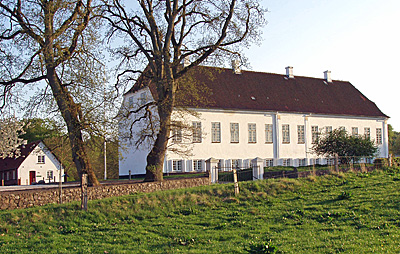 Fussingø herregård i Ålum Sogn , Purhus Kommune (Sønderlyng Herred, Viborg Amt, Denmark).